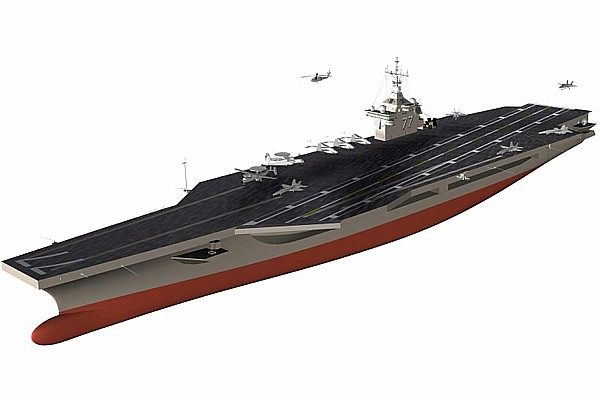 Official US Navy Picture